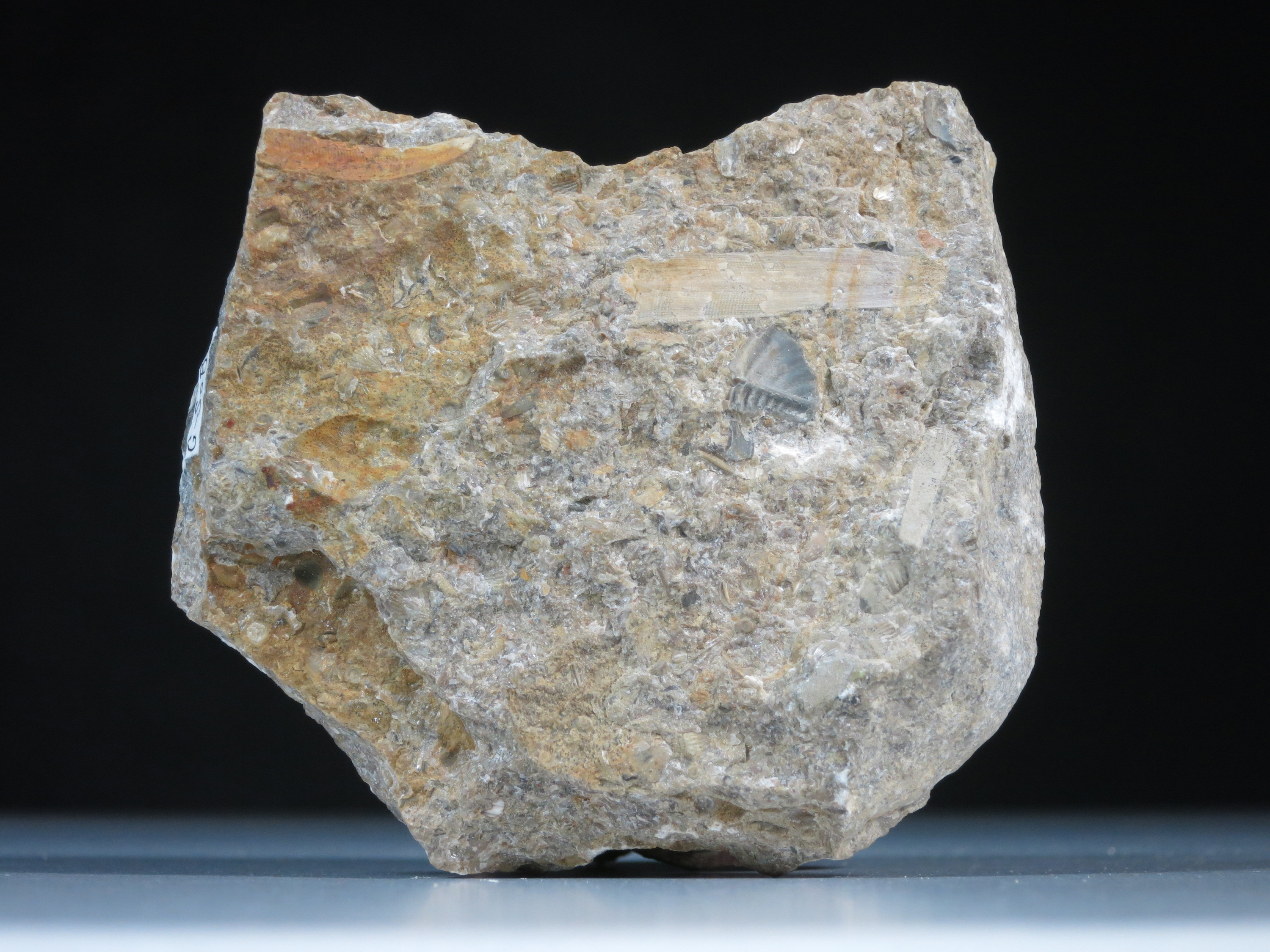 Beyrichienkalk; Herkunft: Ostseeraum, südl. Gotland bis Saaremaa (Estland); Alter: Silur Fundort: Kiesgrube Bralitz